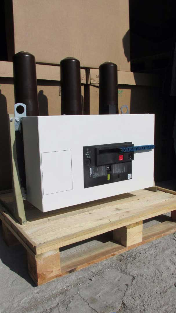 کلید فشار متوسط گازی شرکت اشنایدر الکتریک نماینده در ایران توان پیشتاز کلید